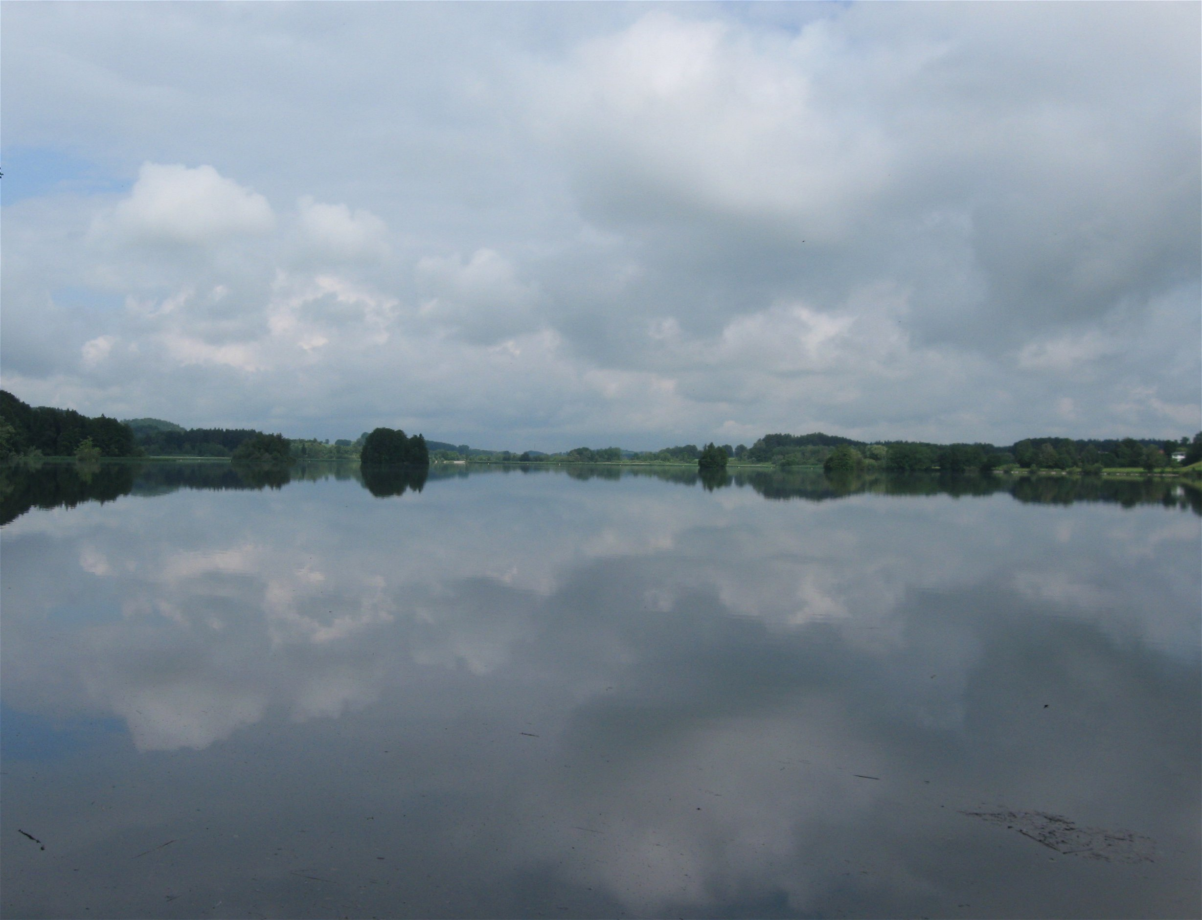 Seehamer See, Weyarn